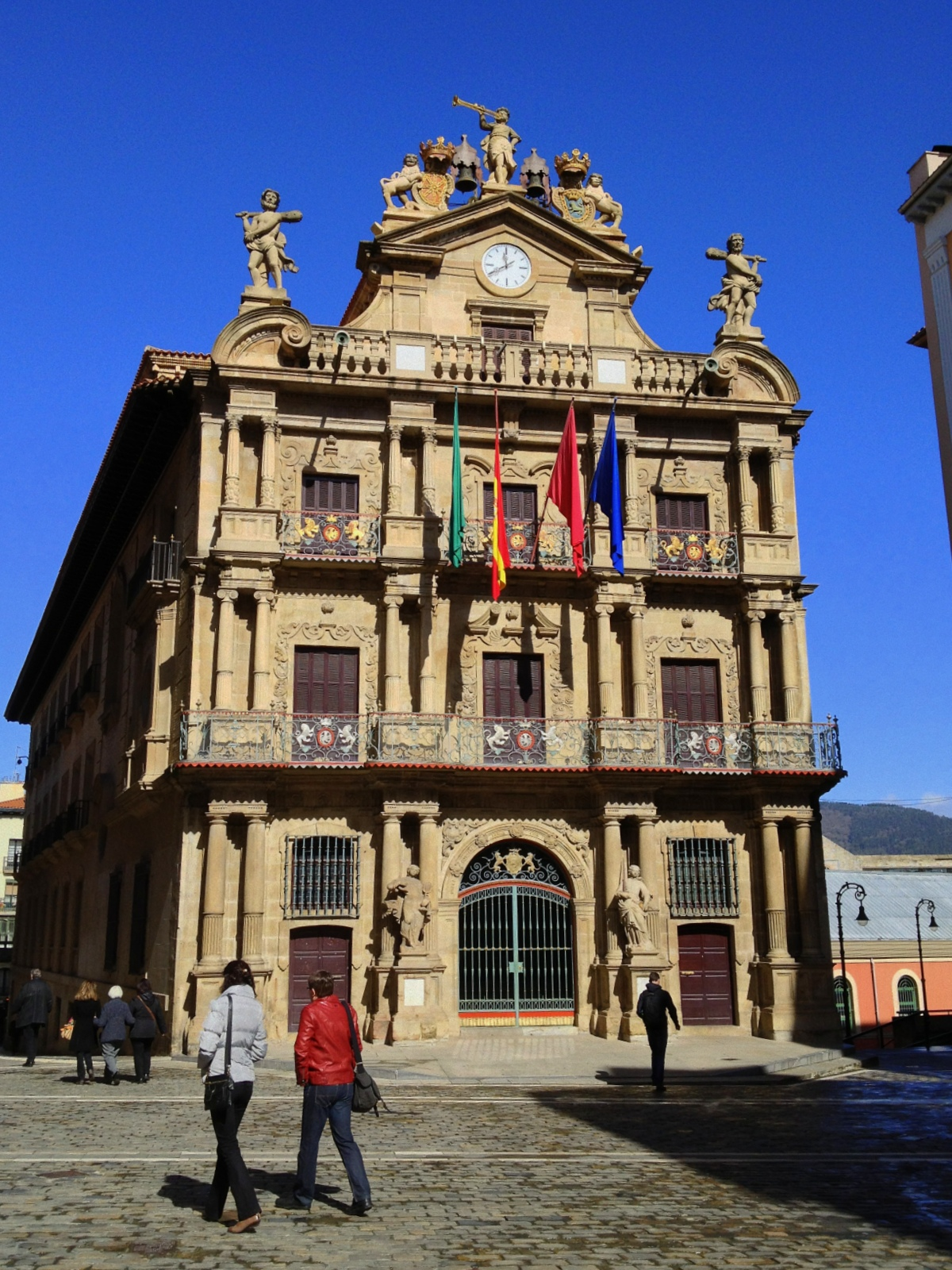 Pamplona